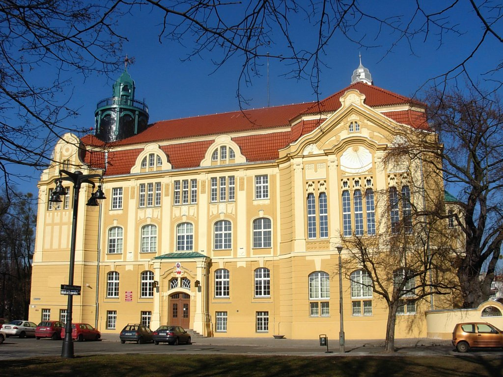 Copernicanum w Bydgoszczy